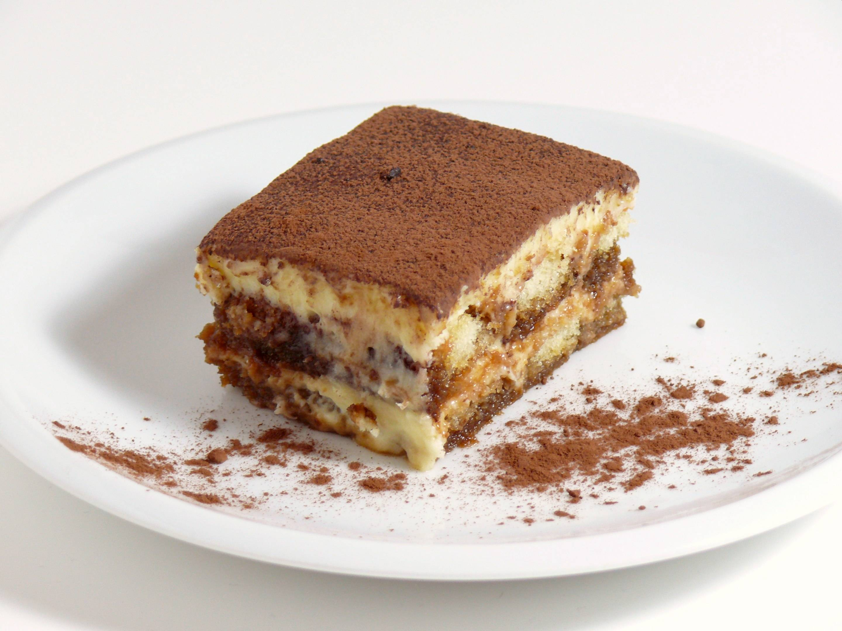 Una porción de tiramisú.